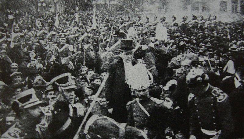 El caudillo de la Unión Cívica Radical Hipólito Yrigoyen asume su primera Presidencia en 1916, teniendo mandato hasta 1922. Sería reelecto en 1928, derrocado en 1930 y moriría en 1932. Con su galera, avanza en medio de una manifestación en su apoyo en la Plaza del Congreso de Buenos Aires, Argentina.